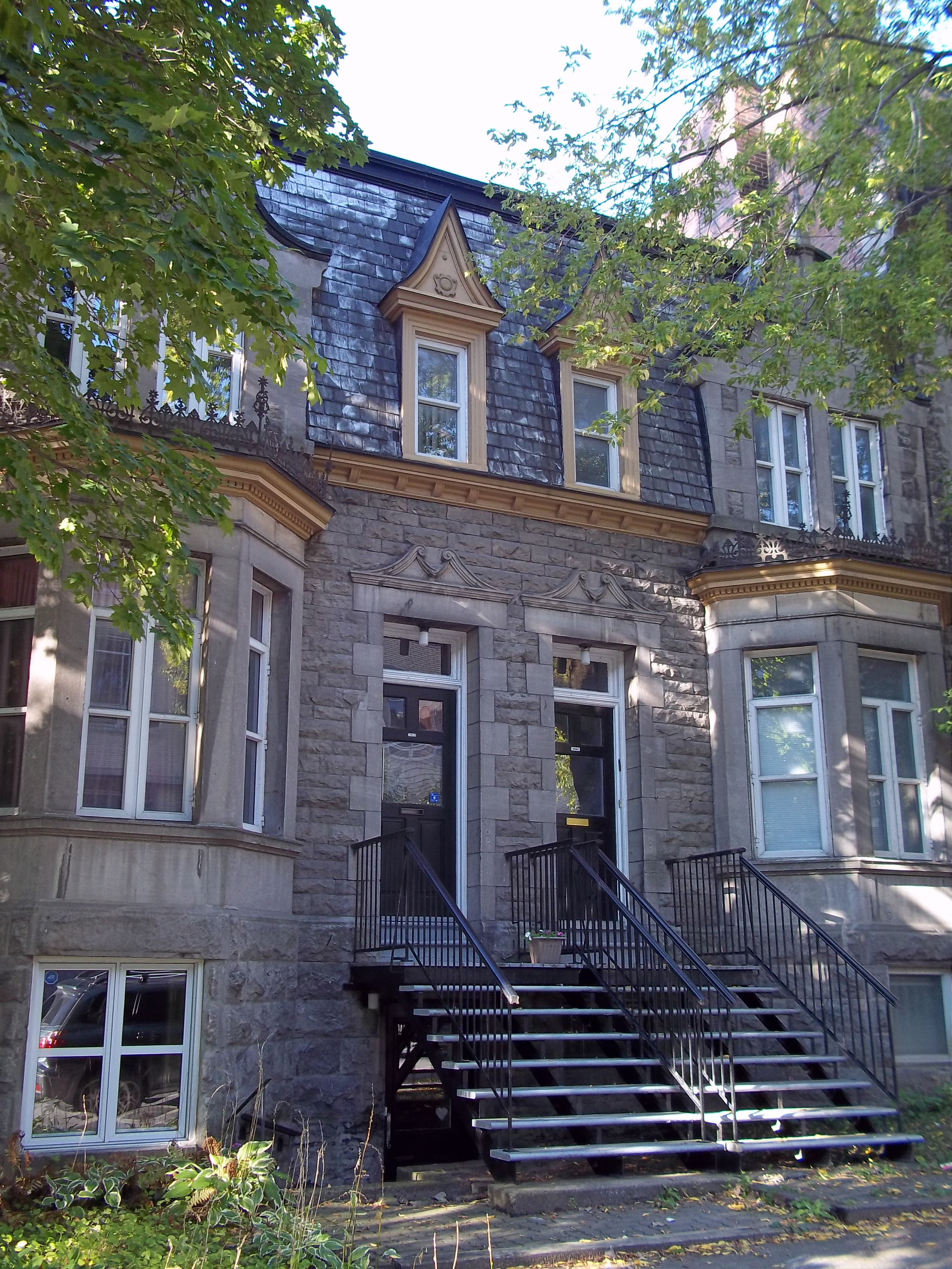 Maisons Charles-Sheppard. À gauche, celle du 2080A-2080B, rue Jeanne-Mance. À droite, celle du 2082, rue Jeanne-Mance, Montréal.